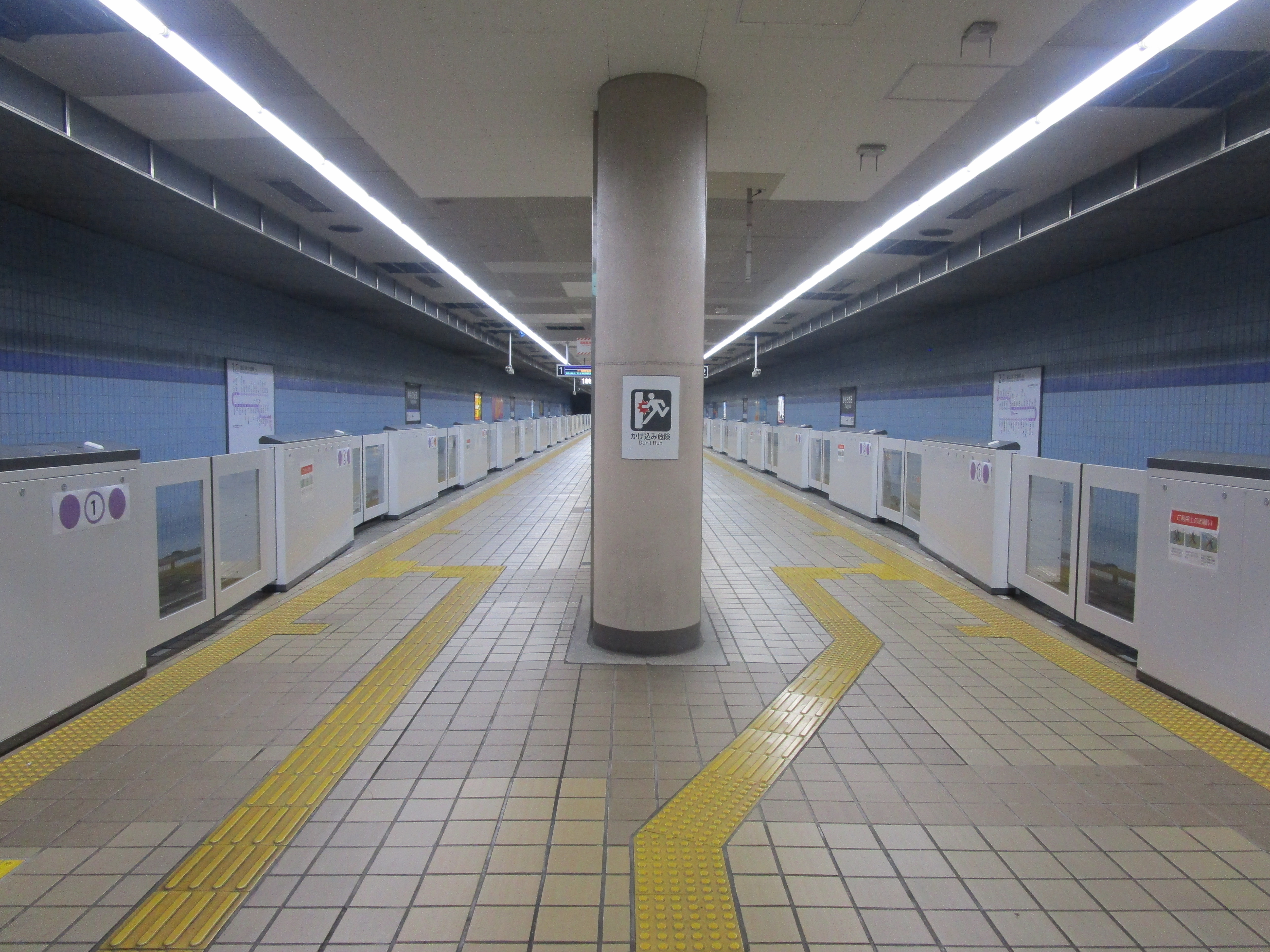 名古屋港駅ホーム（2020年5月30日）